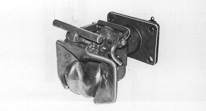 Anhängerkupplung (Hakenkupplung) für militärische LKW